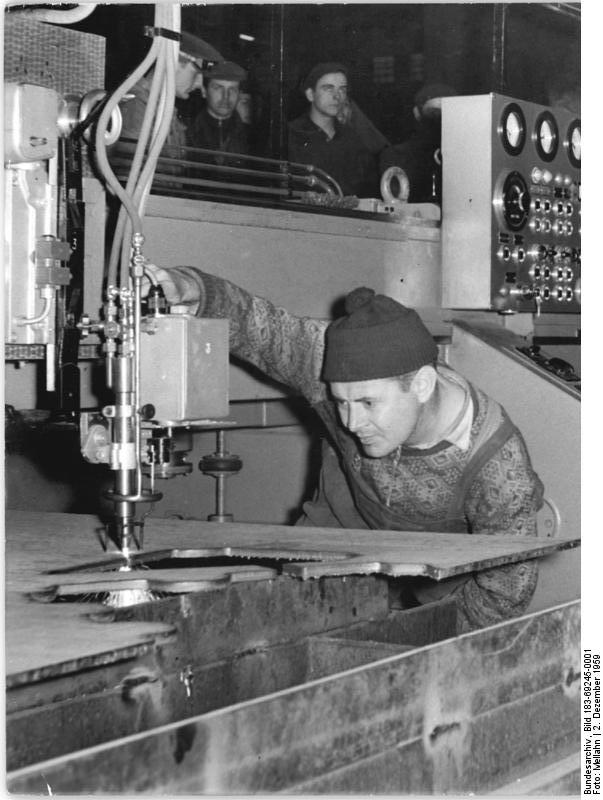 Zentralbild-Mellahn Ma 2.12.59 Probeweise Inbetriebnahme iner foto-optischen Brennschneidemaschine. Am 28.11.59 nahm die Mathias-Thesen-Werft probeweise eine foto-optische Brennschneidemaschine vom Typ "Sicomat" in Betrieb. Die 22 Meter lange Maschine, die mit vier Schneidbrennern ausgerüstet ist, wird 30% der jährlich auf der Werft benötigten 500 000 Schiffsteile bearbeiten. Die Maschine ist Ausgangspunkt für eine künftige Fließfertigung nach einem Programmverfahren im Schiffbau der Werft. UBz: Die foto-optische Brennschneidemaschine vom Typ "Sicomat" läuft probeweise."